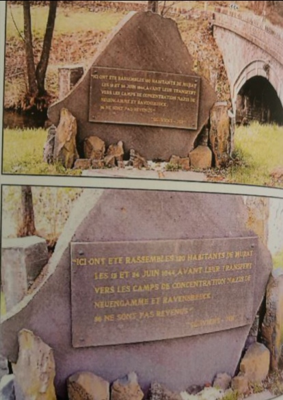 Lieu où a eu lieu l'embarquement dans les camions.